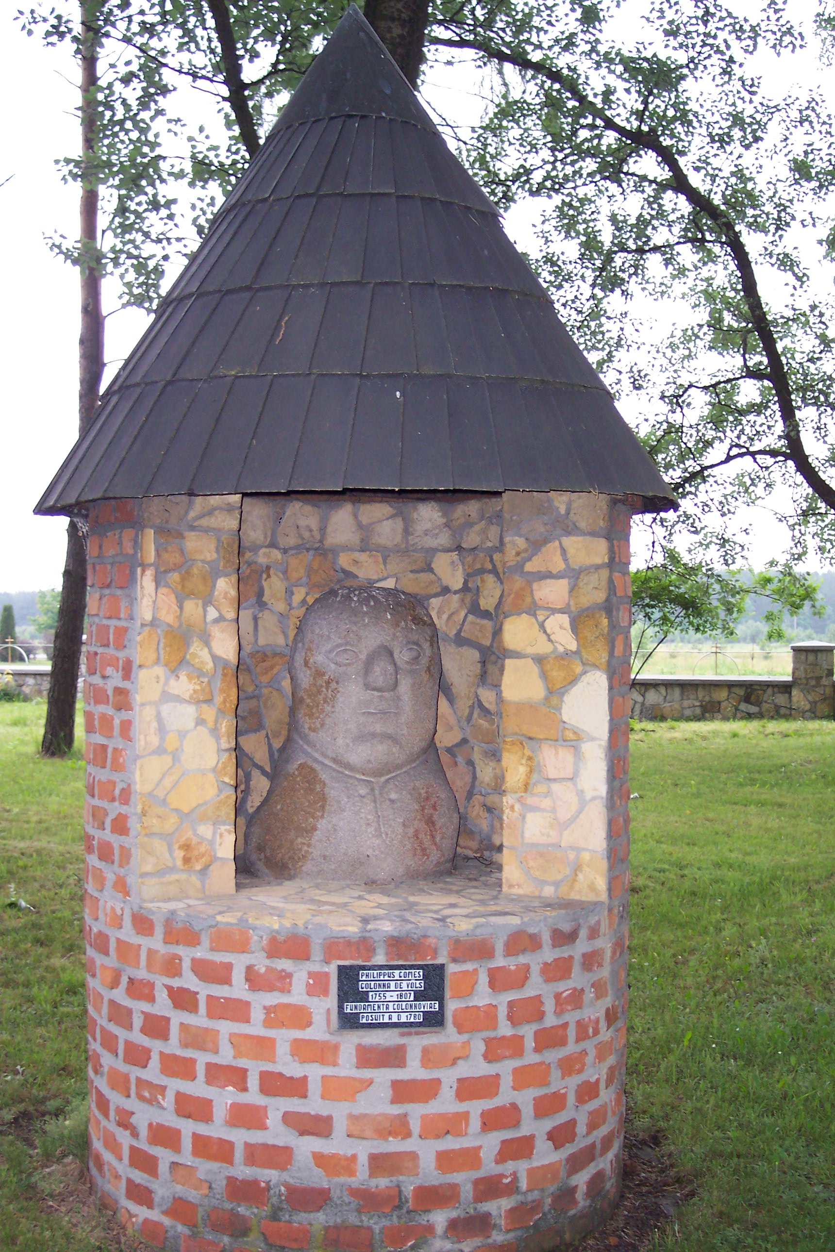 Kolonowskie, ul. Leśna 13 - rzymskokatolicki kościół parafialny pw. Niepokalanego Serca Maryi, 1949-1954